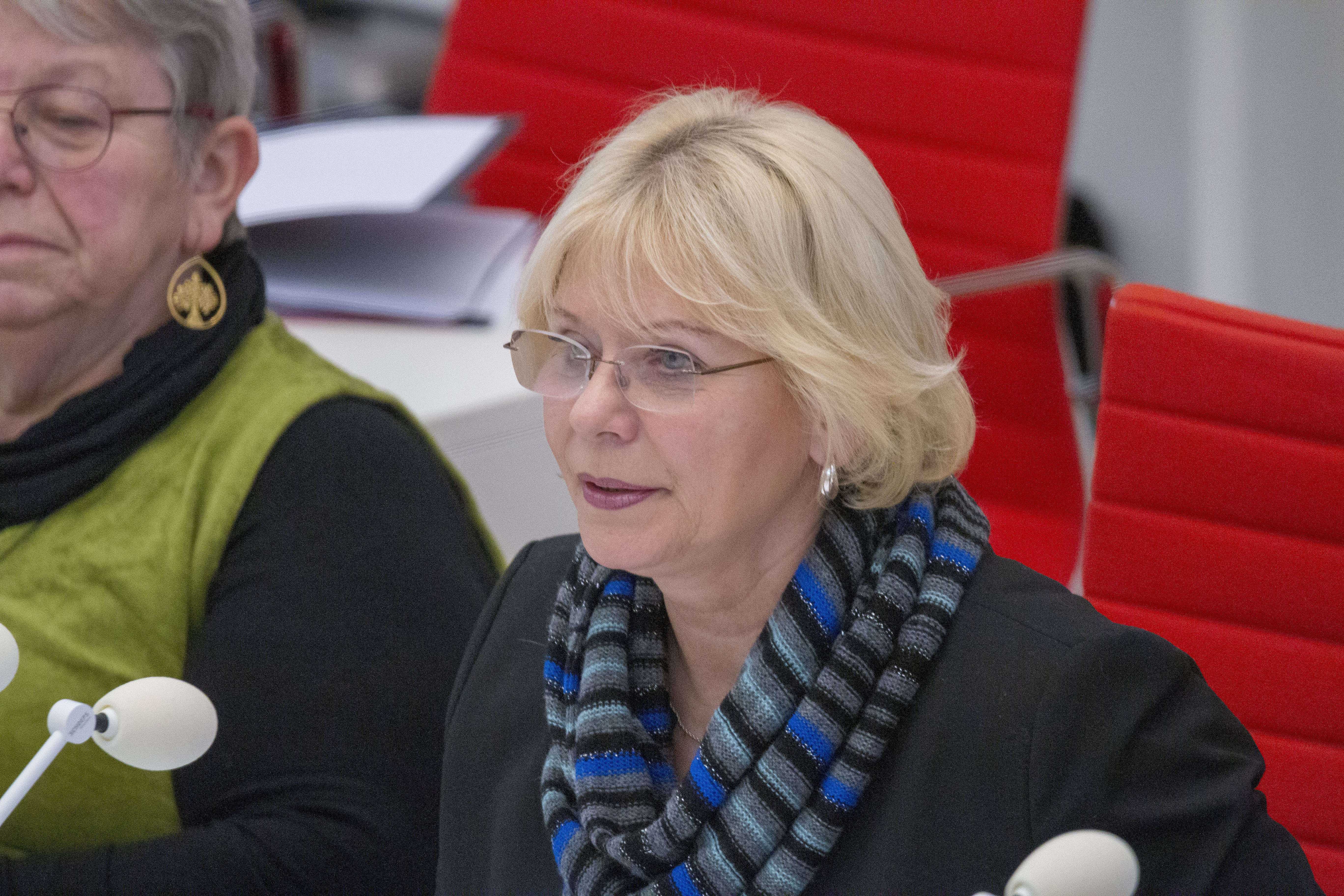 Ulrike Liedtke am 22. Januar 2020 während einer Plenarsitzung im Landtag Brandenburg.